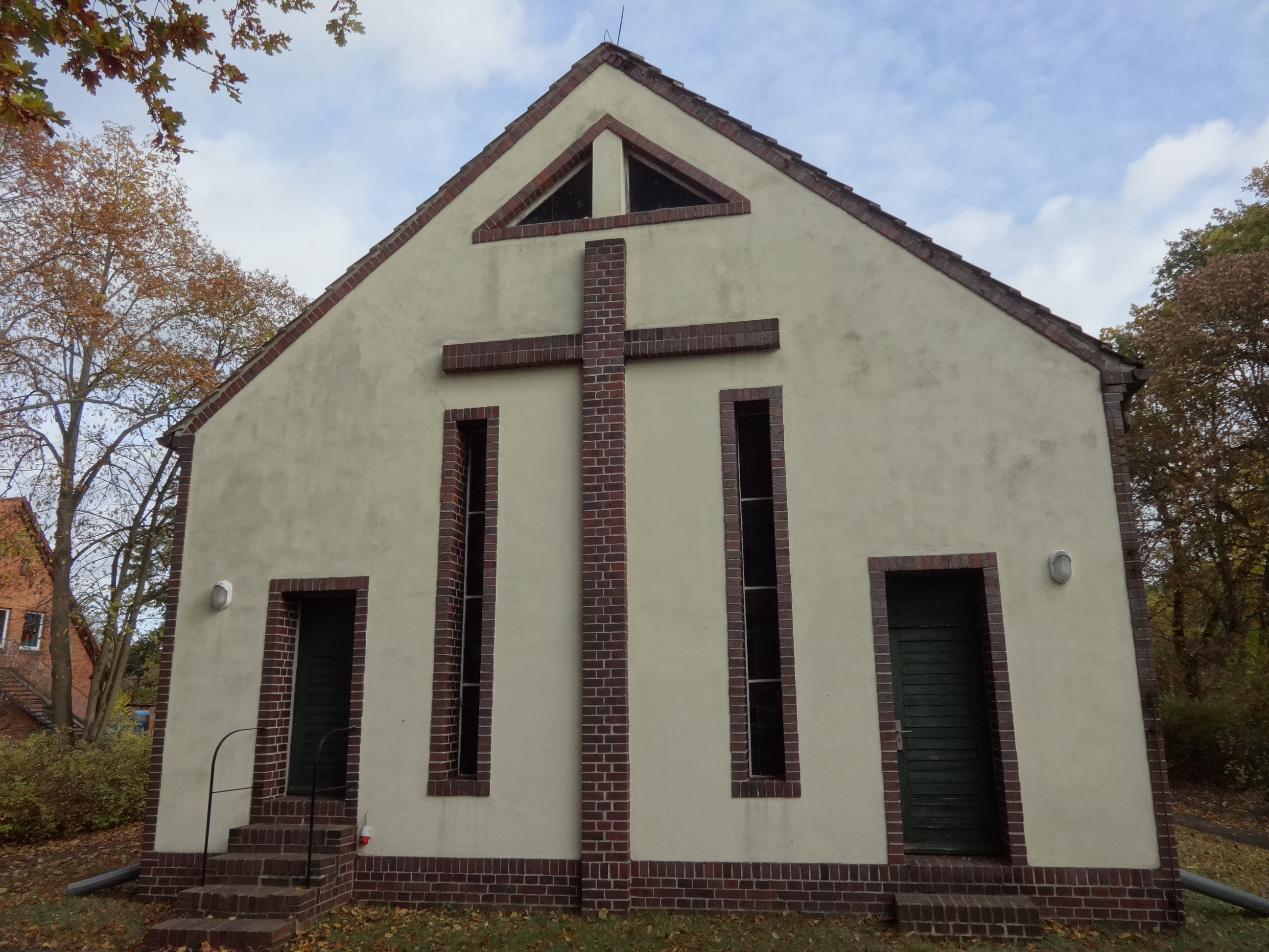 Die Dorfkirche Paulinenaue ist ein im Stil des ausgehenden Expressionismus errichteter Sakralbau, der in den Jahren 1931 bis 1932 unter der Leitung des Berliner Architekten Rettich entstand.